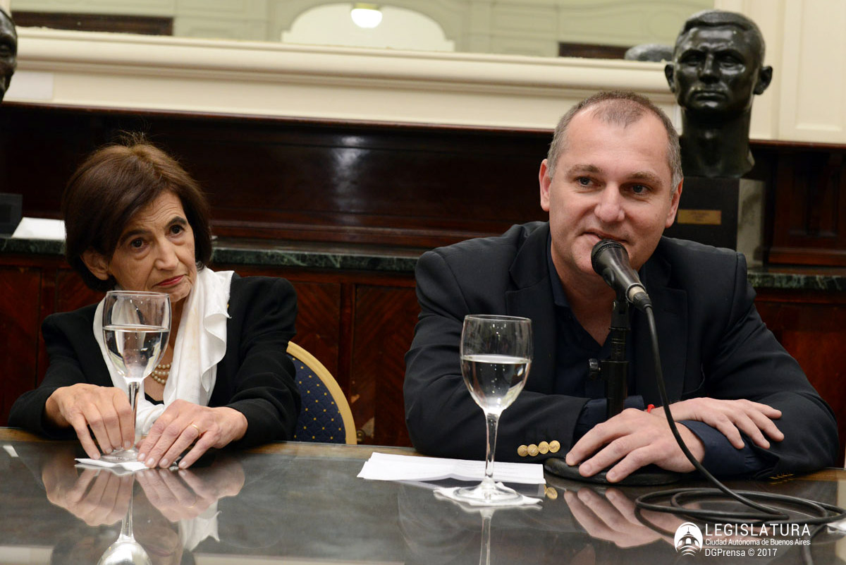 Lucía Gálvez y el diputado Hernán Rossi durante la ceremonia que la distingue como Personalidad Destacada de la Cultura